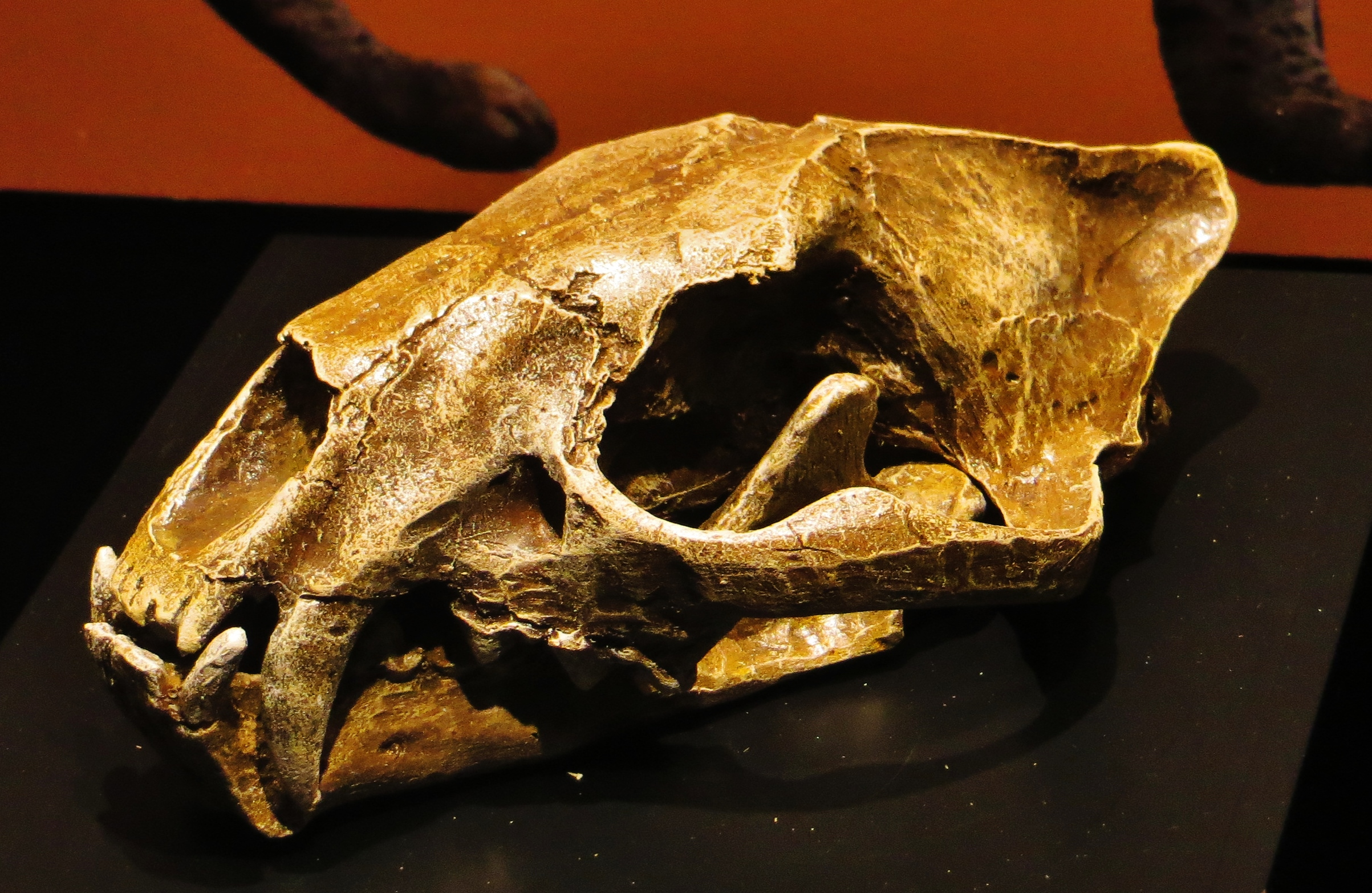 Fossil - Took the picture at Museo di Storia Naturale di Calci - Pisa